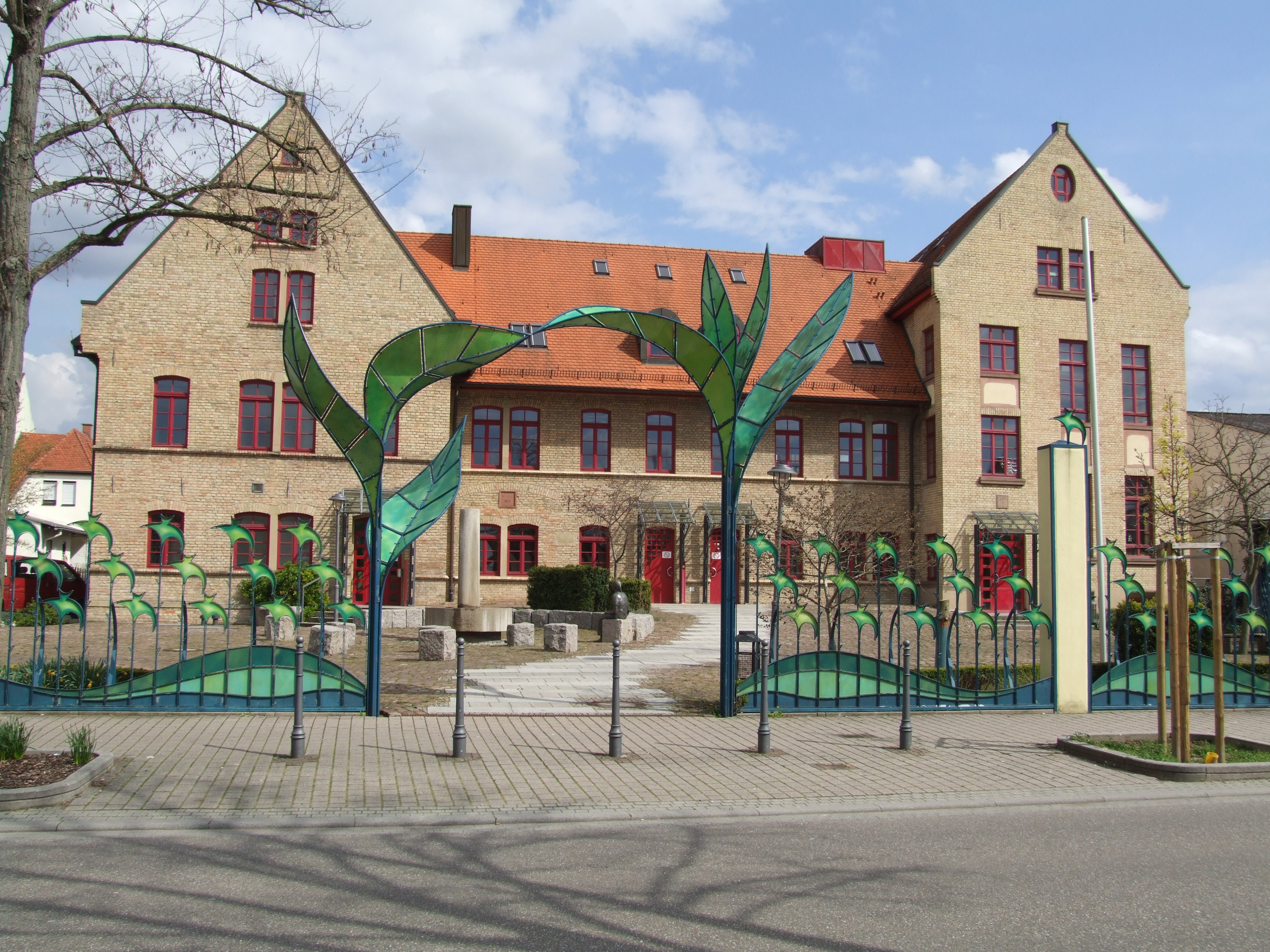 Bürgerhaus Wellensiek&Schalk, Oberhausen